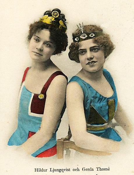 Hildur Ljungqvist (later Lithman) och Gerda Thomé